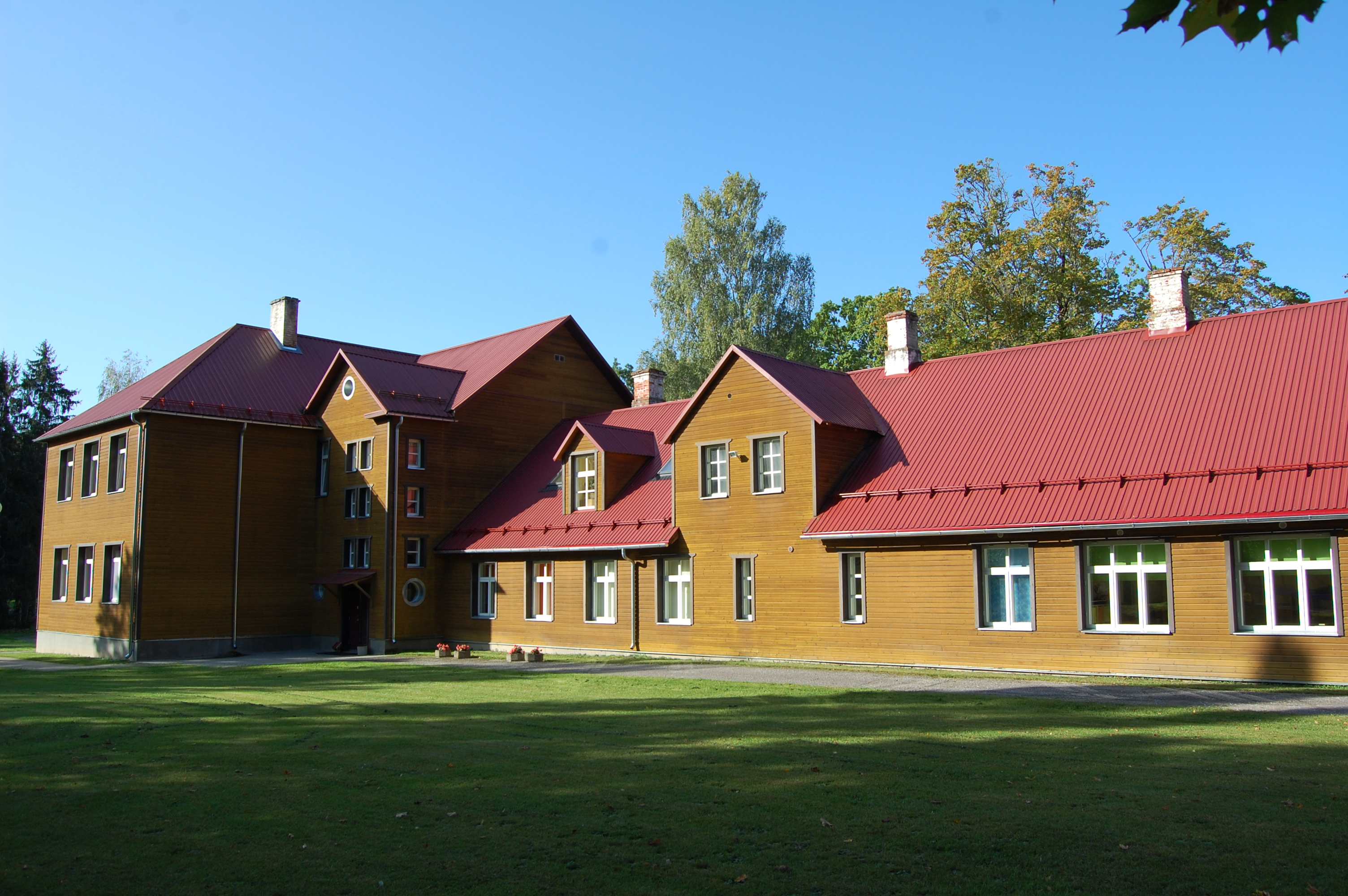 Pisisaare kool Põltsamaa vallas 2019. aasta septembris